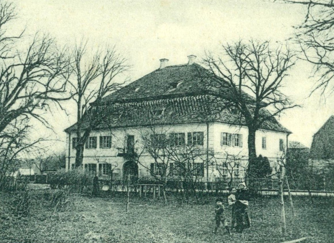 Poststation Ponholz von 1766, um 1900